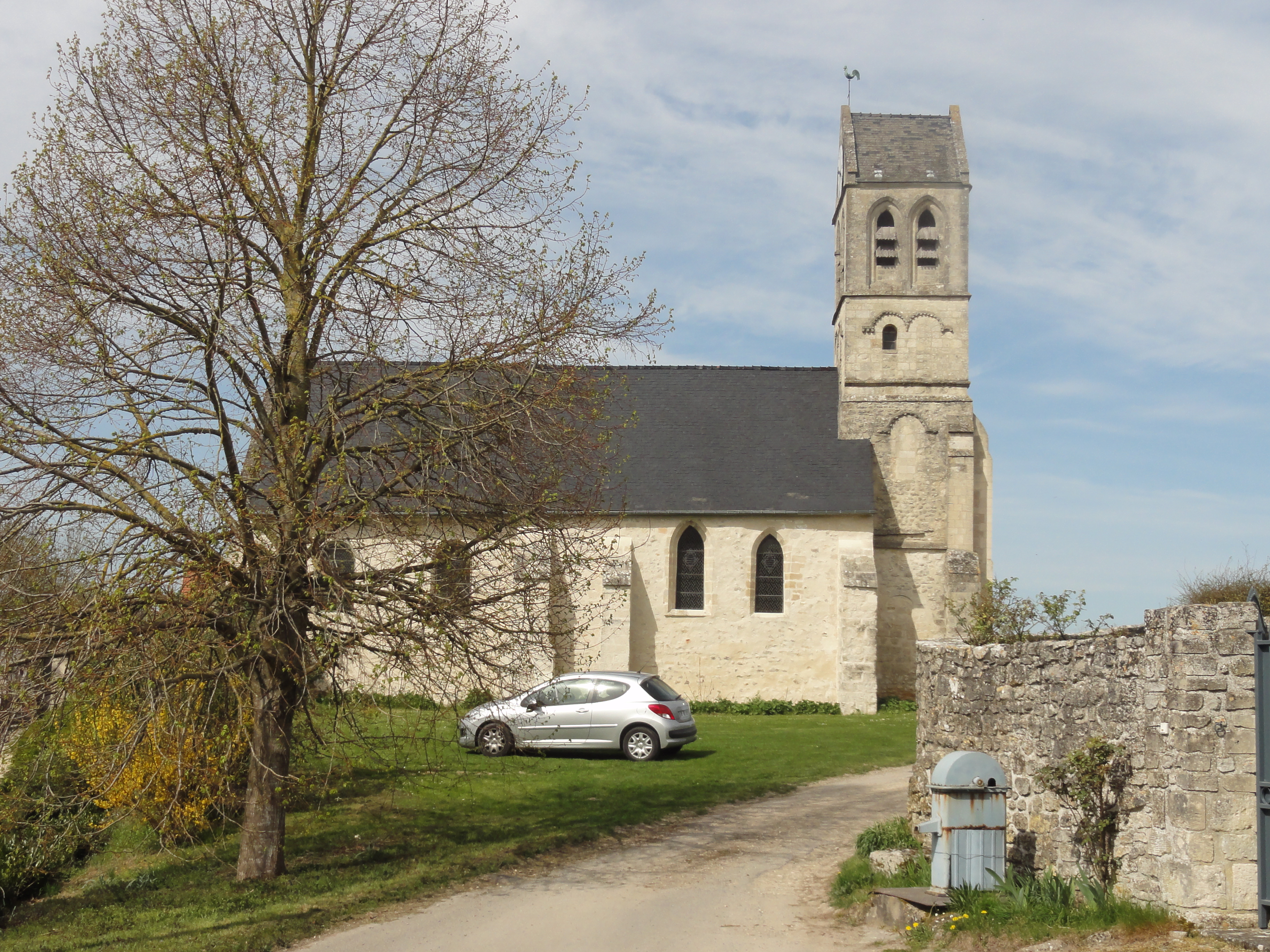 Église Saint-Pierre de Duvy (voir titre).